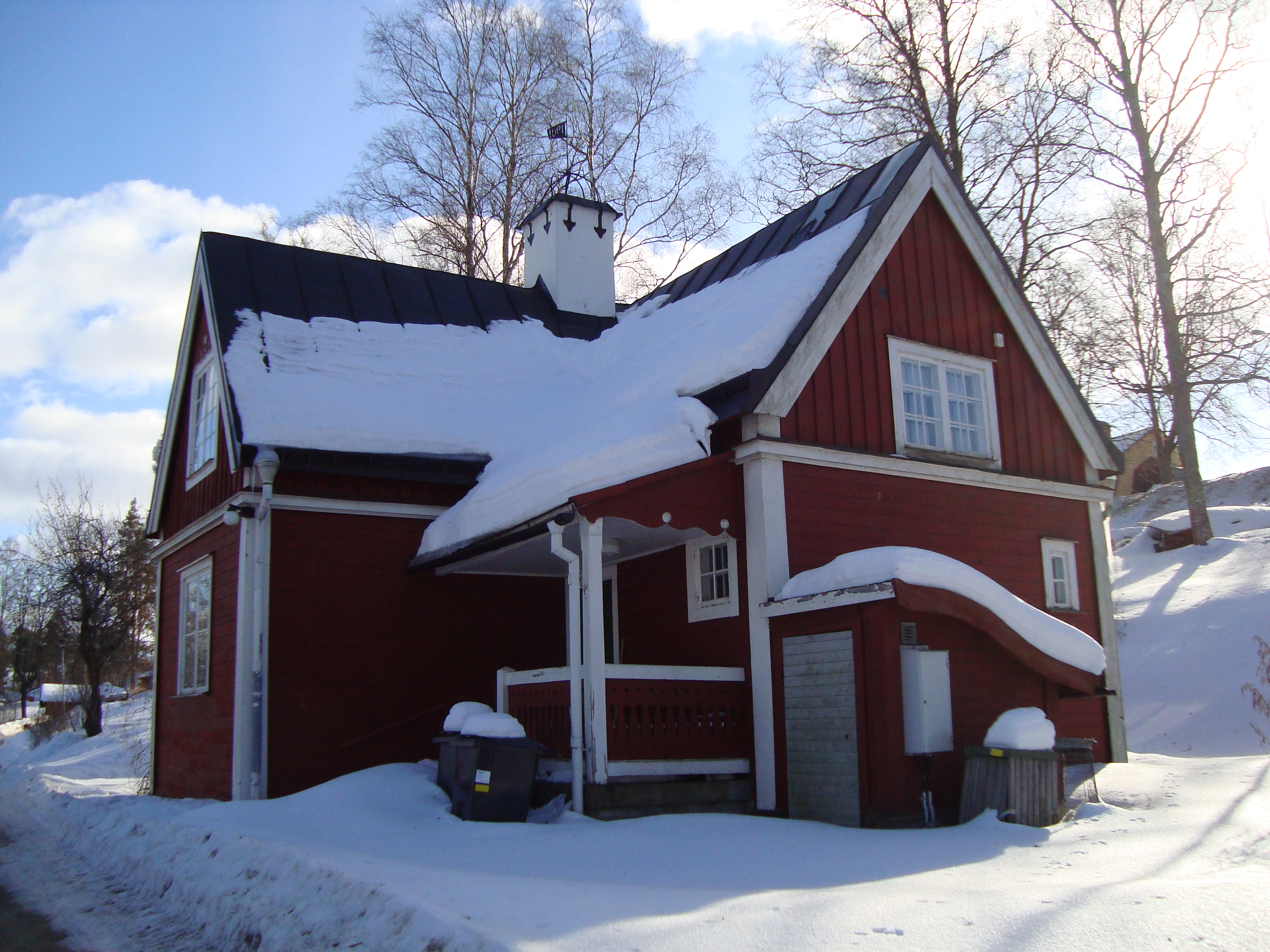 Vaktmästarbostaden för el- och vattenverket Petersburg, intill Gammelgården, Hedemora, Sverige